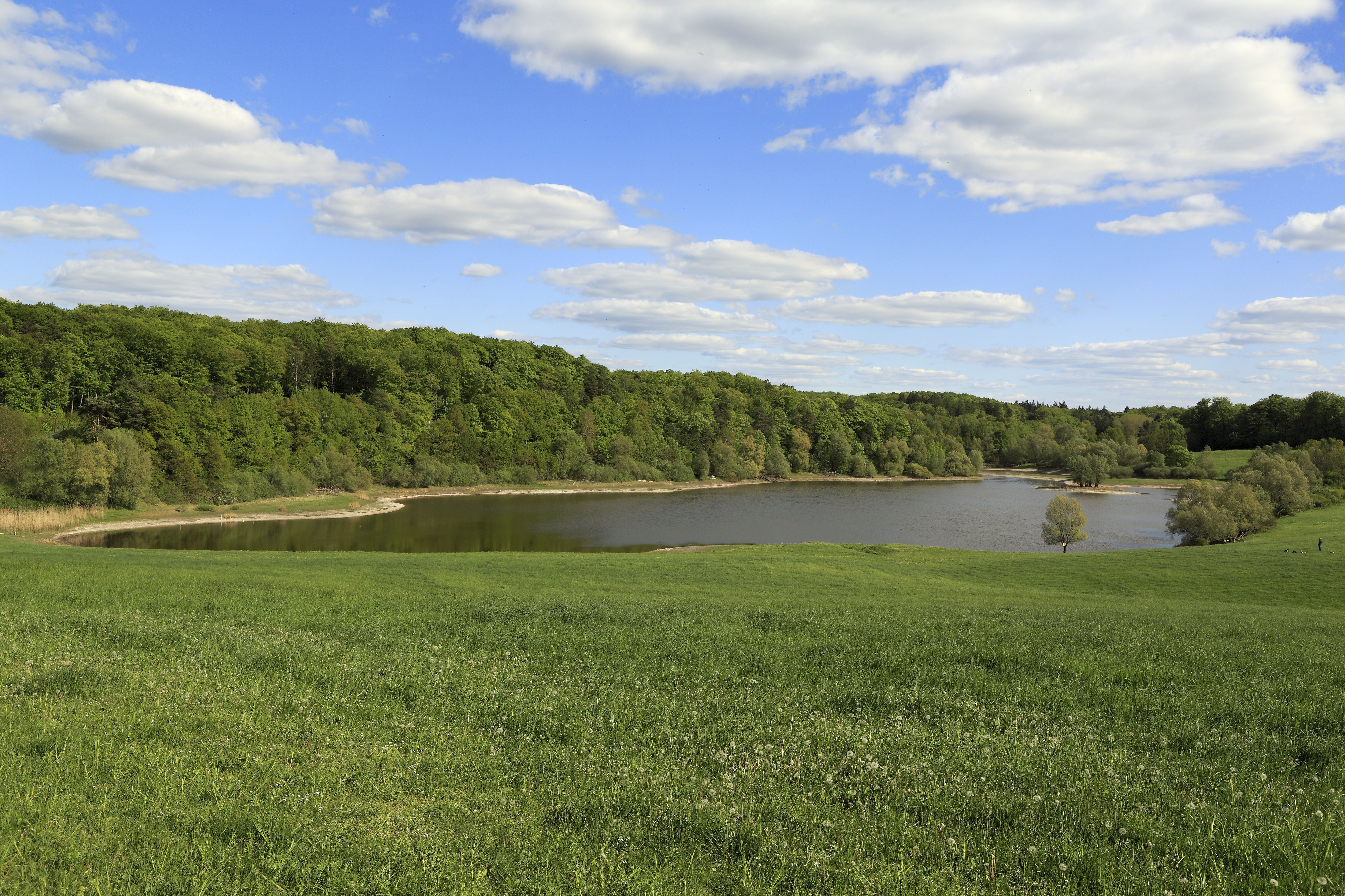 Blick von Nordwesten, im Vordergrund Weidefläche. Der Wasserstand liegt eher tief.